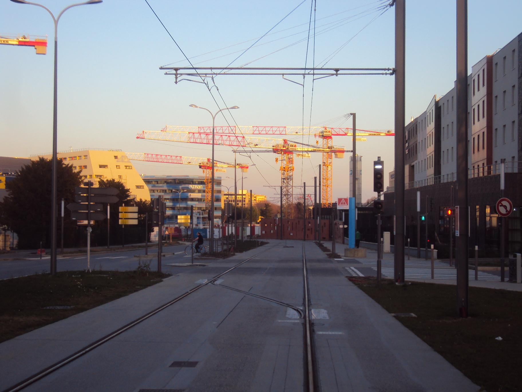 Travaux du T6 Vélizy